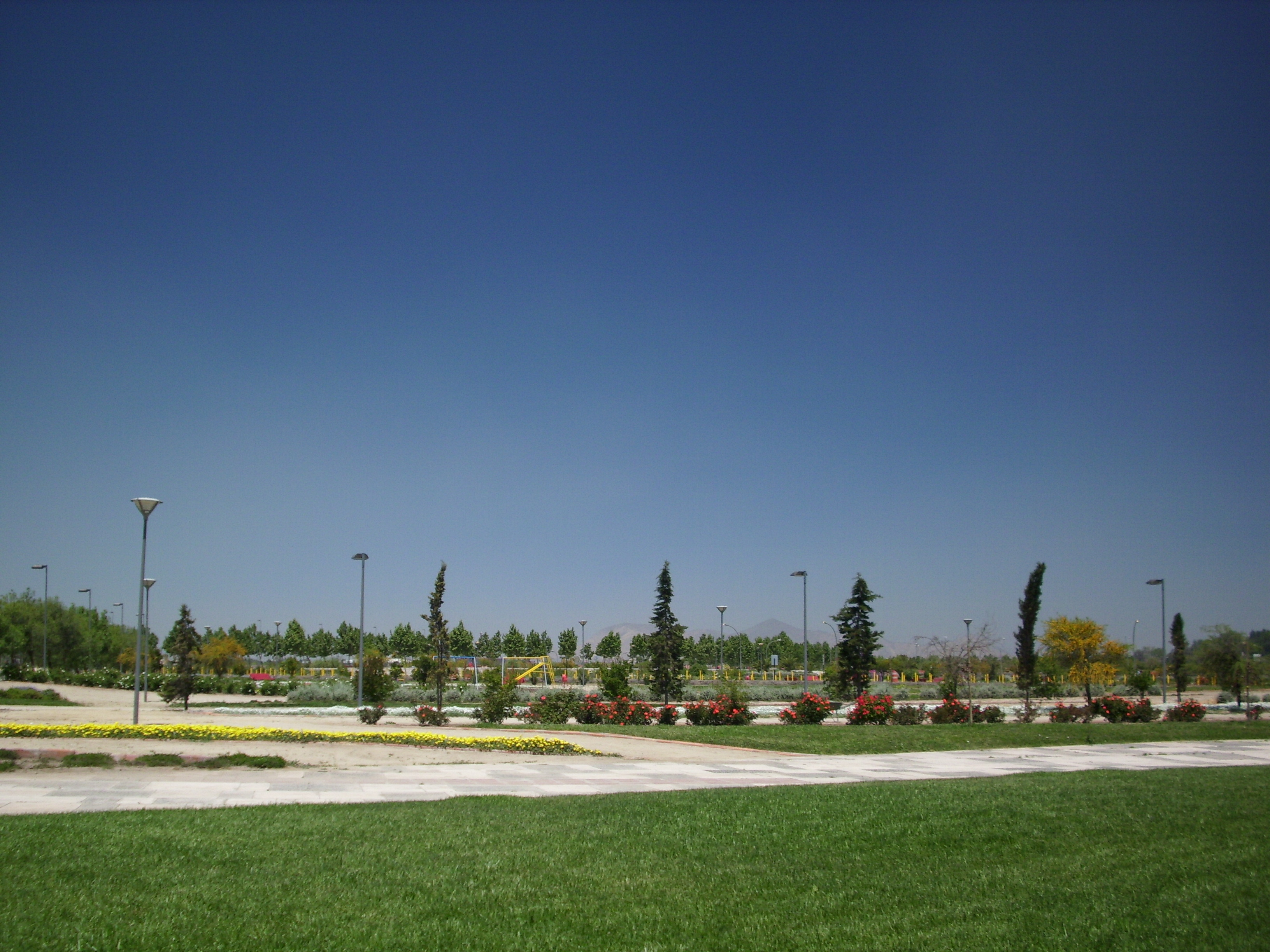 El Parque Portal Bicentenario en la comuna de Cerrillos, Santiago de Chile.